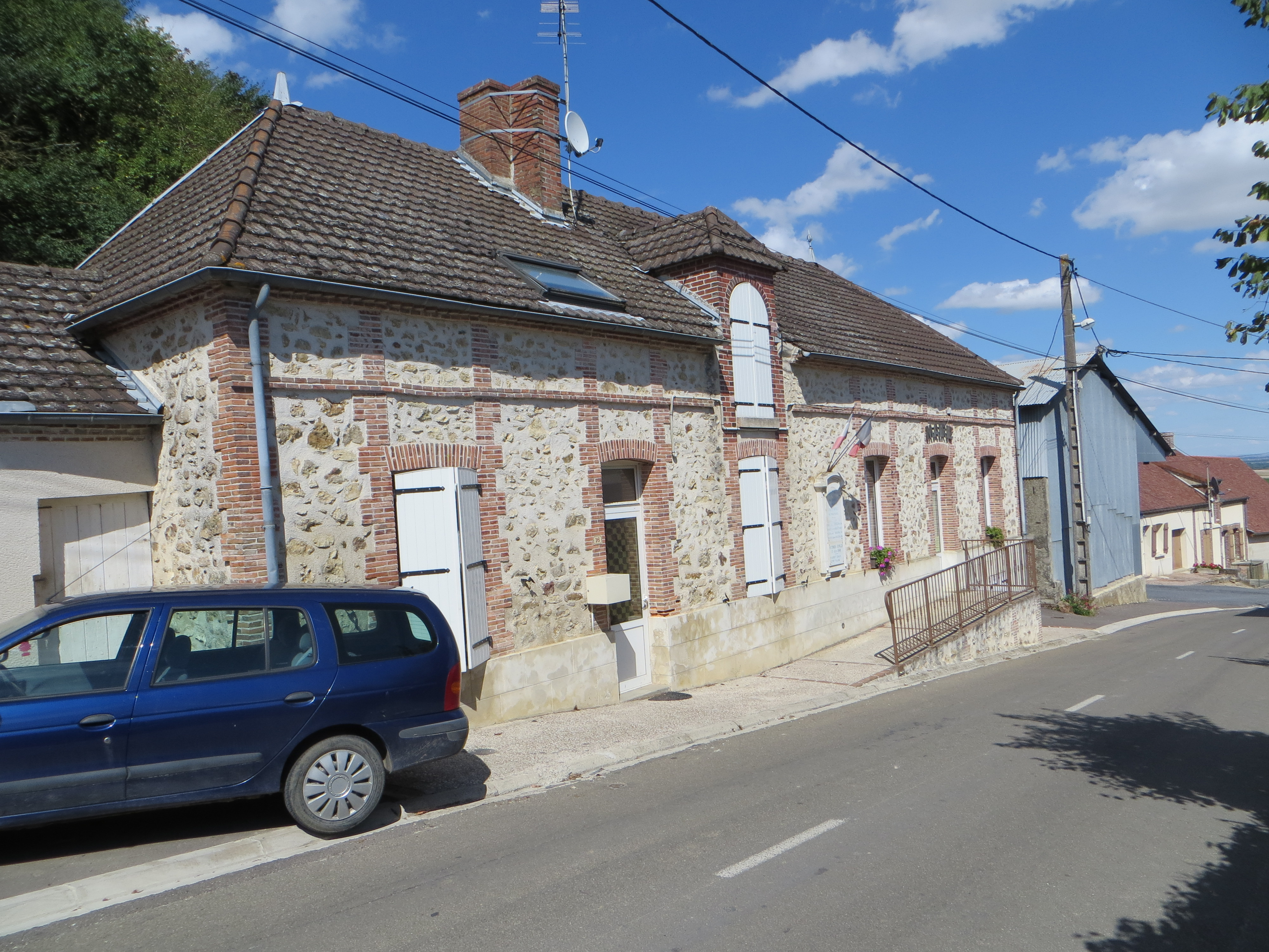 Mairie du village